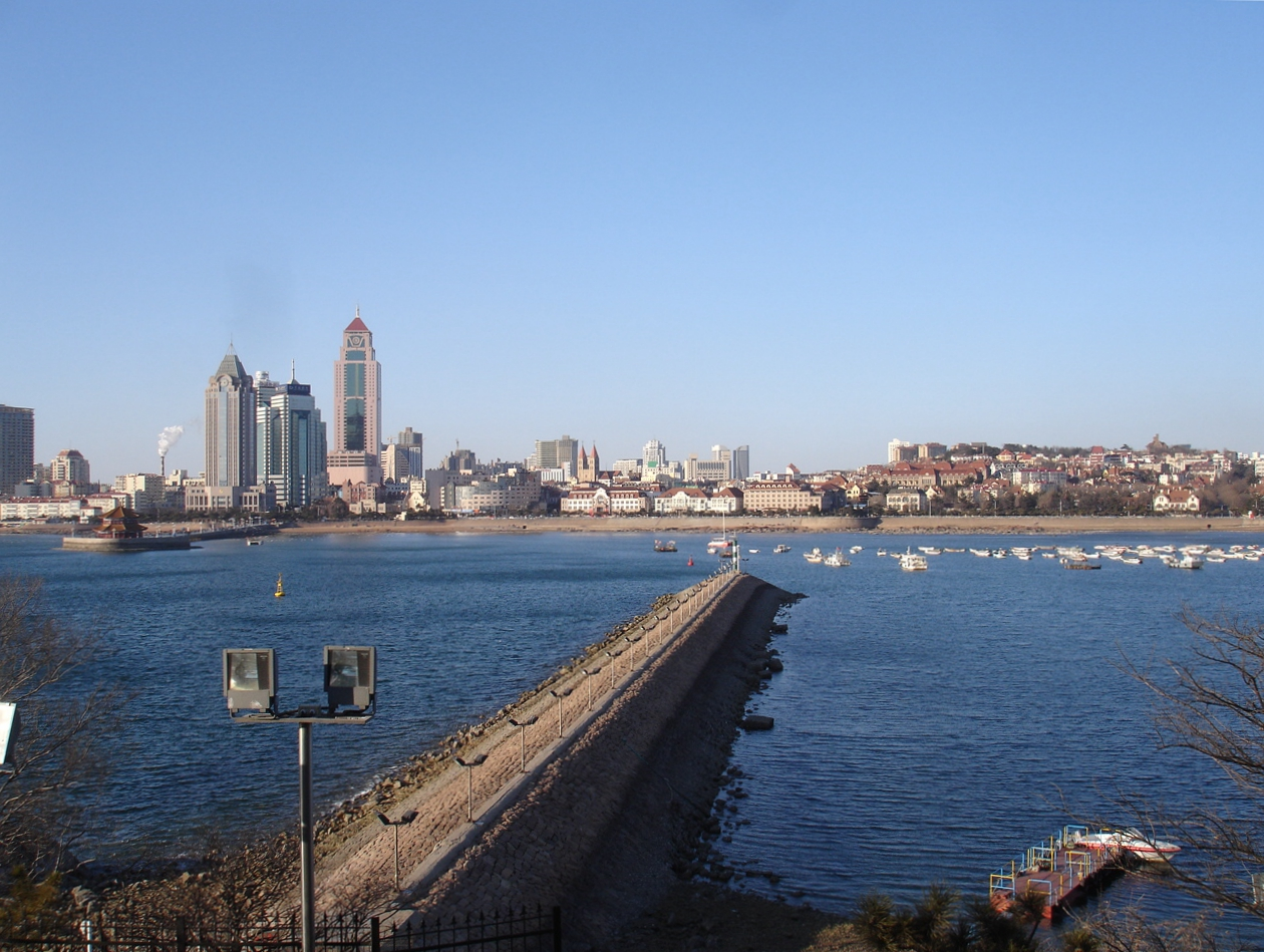 青岛前海远景摄自小青岛